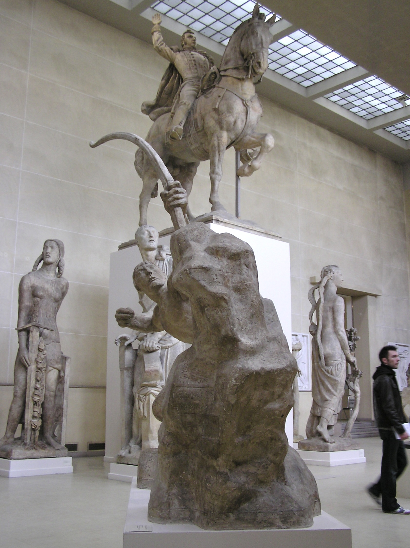 Salle des plâtres du musée Bourdelle à Paris